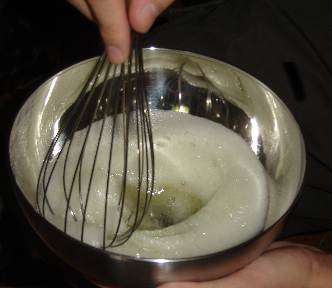 Comment battre des oeufs en neige - fouet